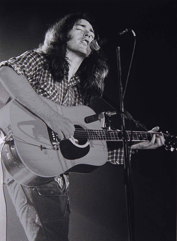 Rory Gallagher Het Turfschip Breda The Netherlands, 02 April 1978